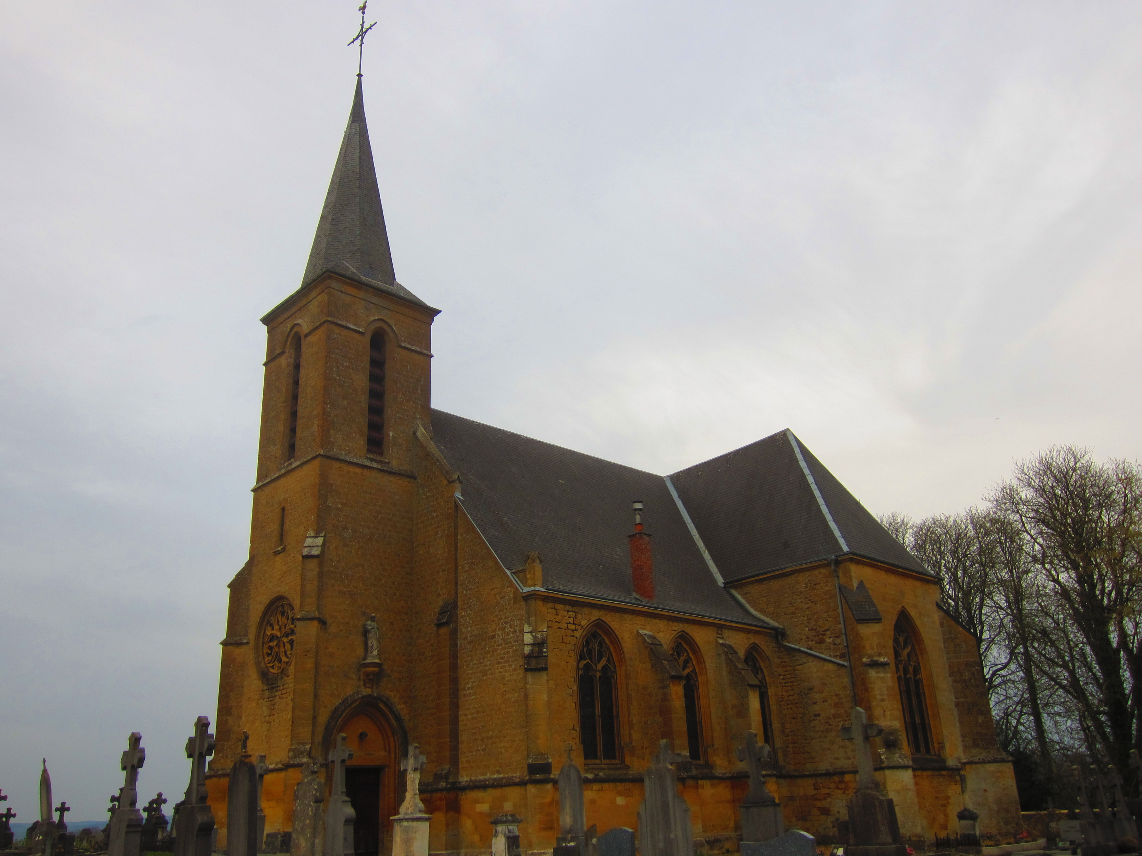 Wadelaincourt Église Notre-Dame